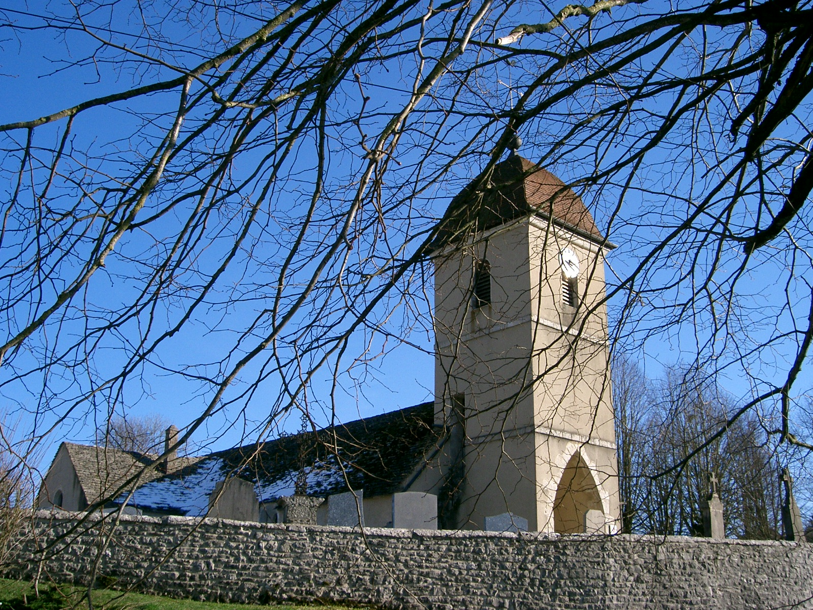 Église Saint-Georges de Songeson - France - Jura (39)